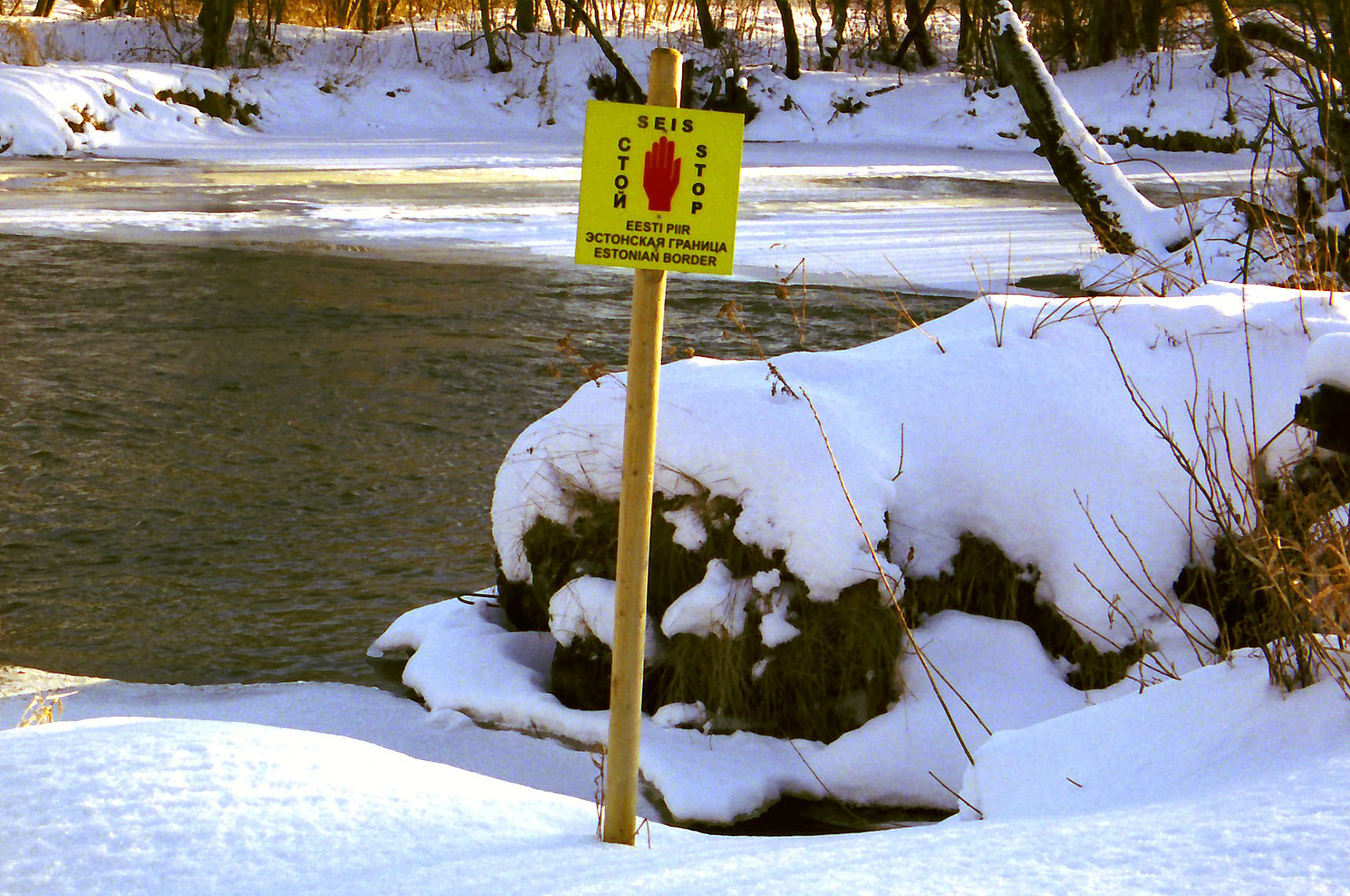 Hoiatussilt Eesti Vabariigi ja Vene Föderatsiooni vahelisel kontrolljoonel.